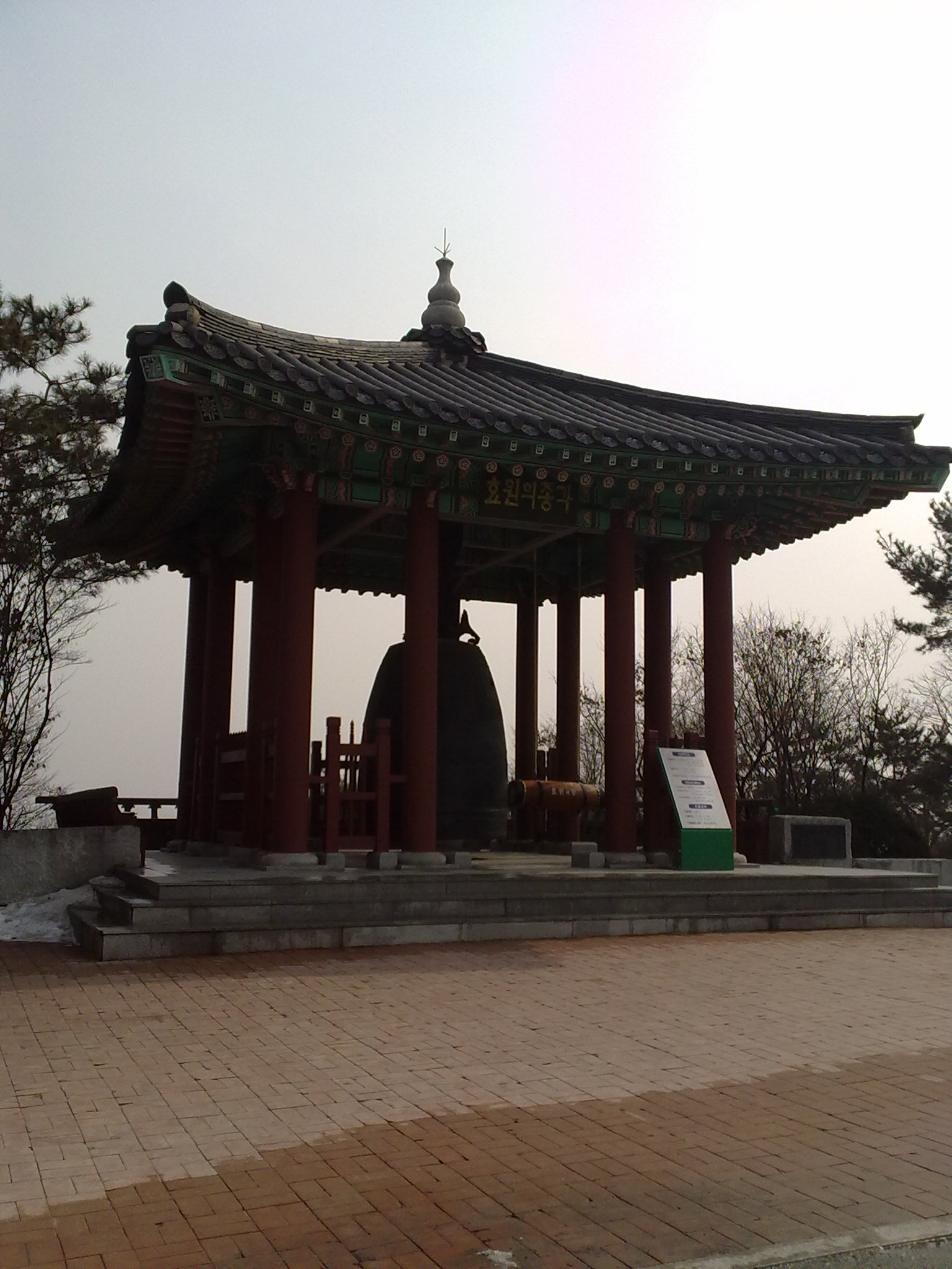 수원 화성 효원의 종각